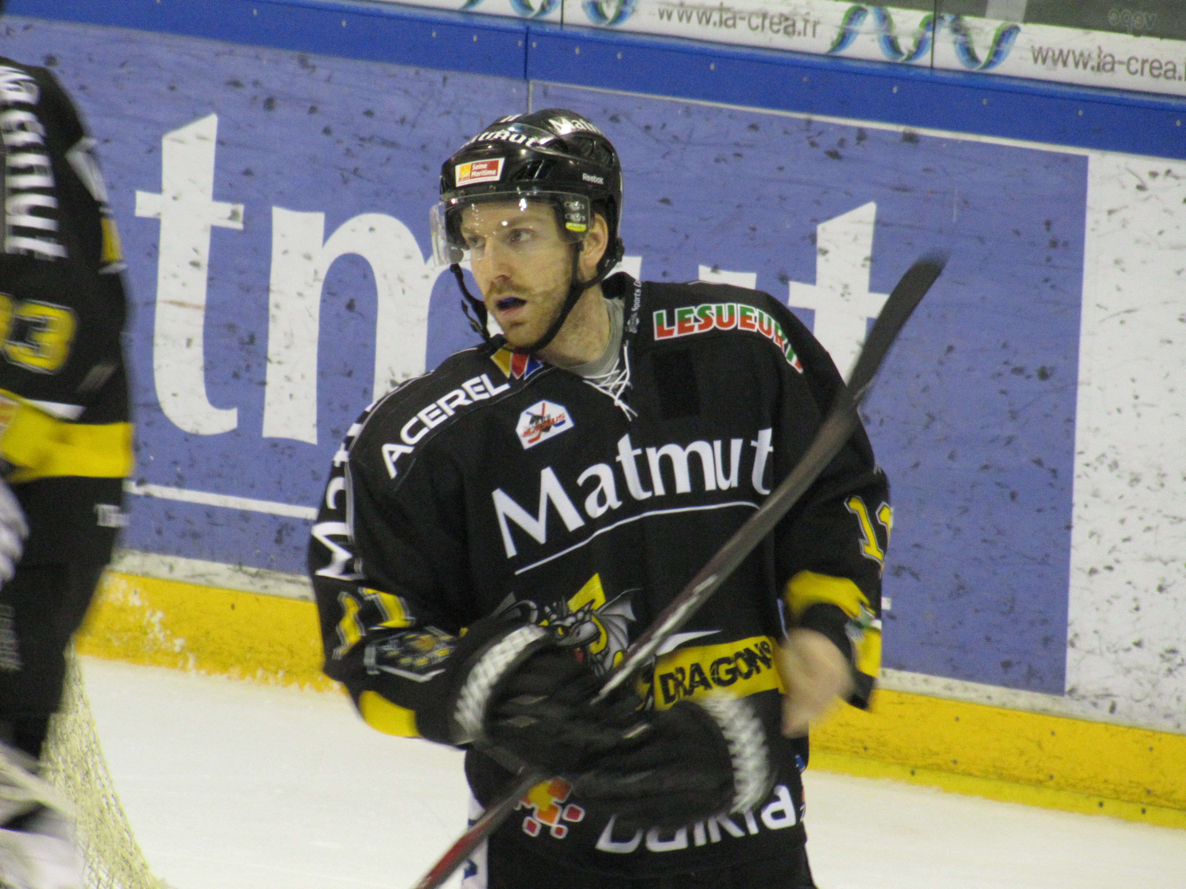 François-Pierre Guénette lors de la Coupe Continentale de hockey 2012 à Rouen